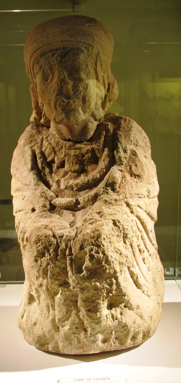 Dama ibèrica de Cabdet, segle IV a.C.